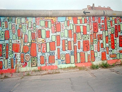 Fast Form Manifest, Bethaniendamm, Berlin Kreuzberg, 1987.